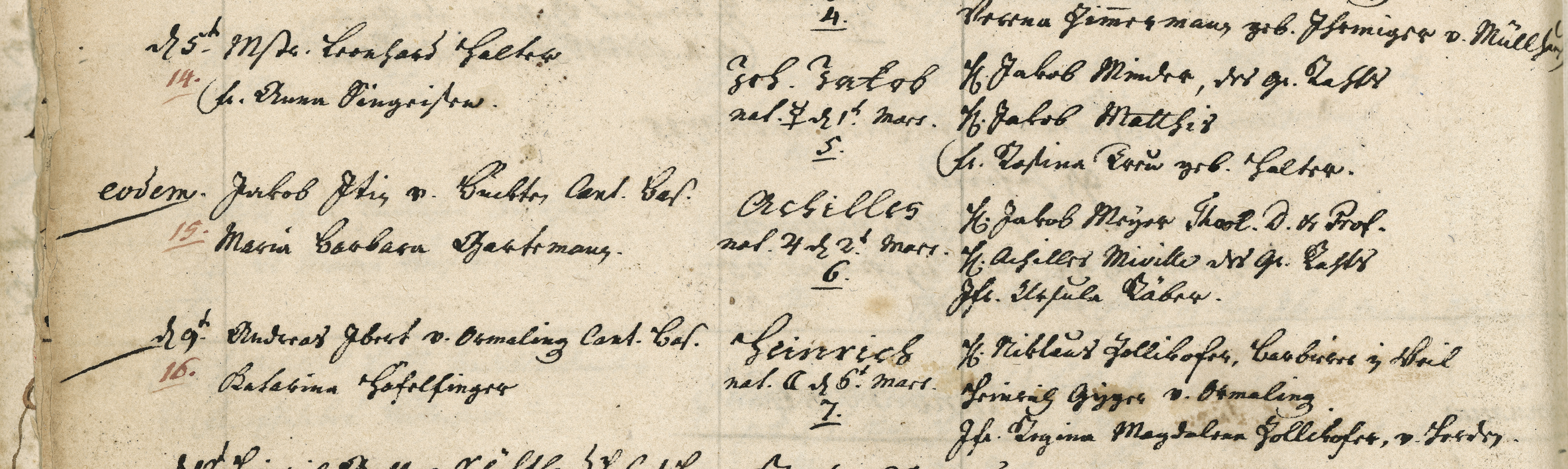 Theo der Pfeifenraucher: Taufeintrag Achilles Itin, 2. März 1786, Taufbuch der Theodorskirche